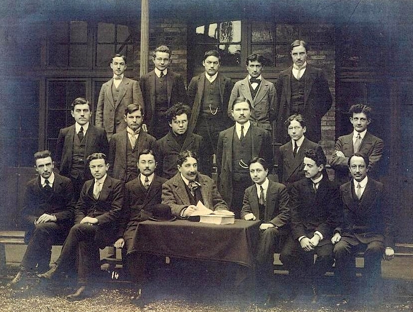 Photo de classe au lycée Henri IV (Paris, 5e arrond.). Vers 1914, le professeur àla table est le philosophe Alain. Photographe inconnu.